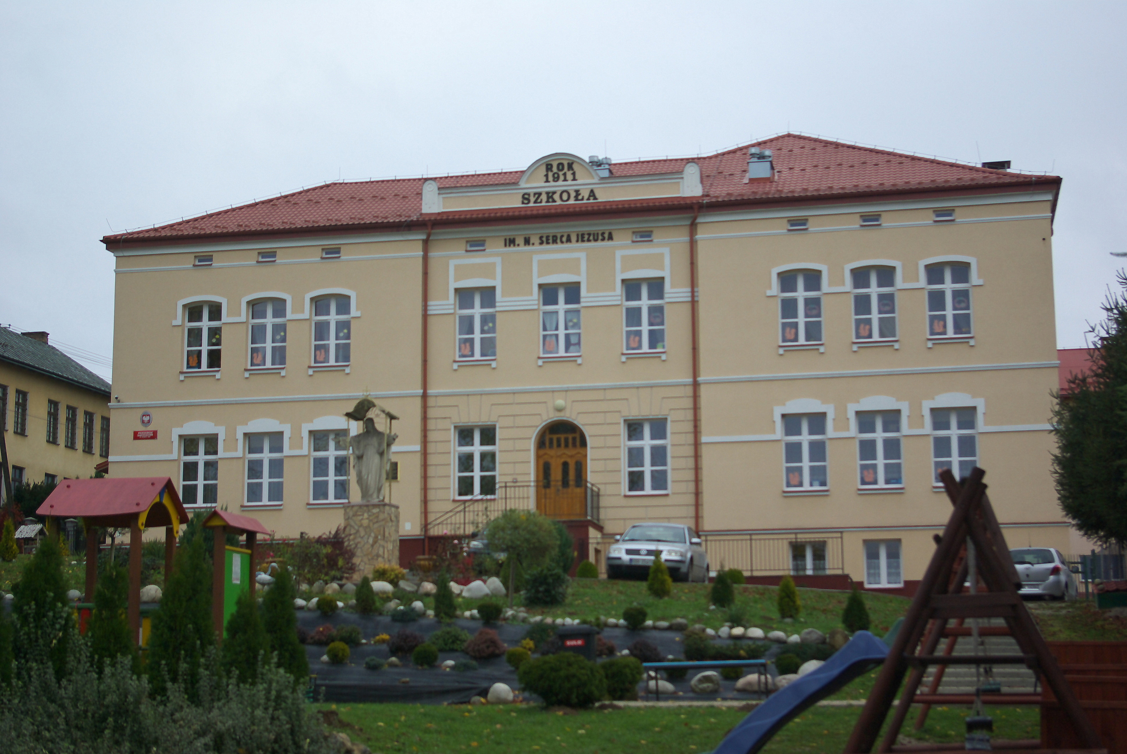 Zespół Szkół w Starej Wsi, stan w 2017: 1. Szkoła Podstawowa im. Najświętszego Serca Jezusa 2. Gimnazjum im. ks. Stefana Weidla.